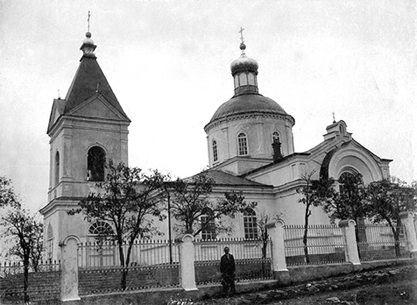 Ростовская область Николаевка. Церковь Николая Чудотворца